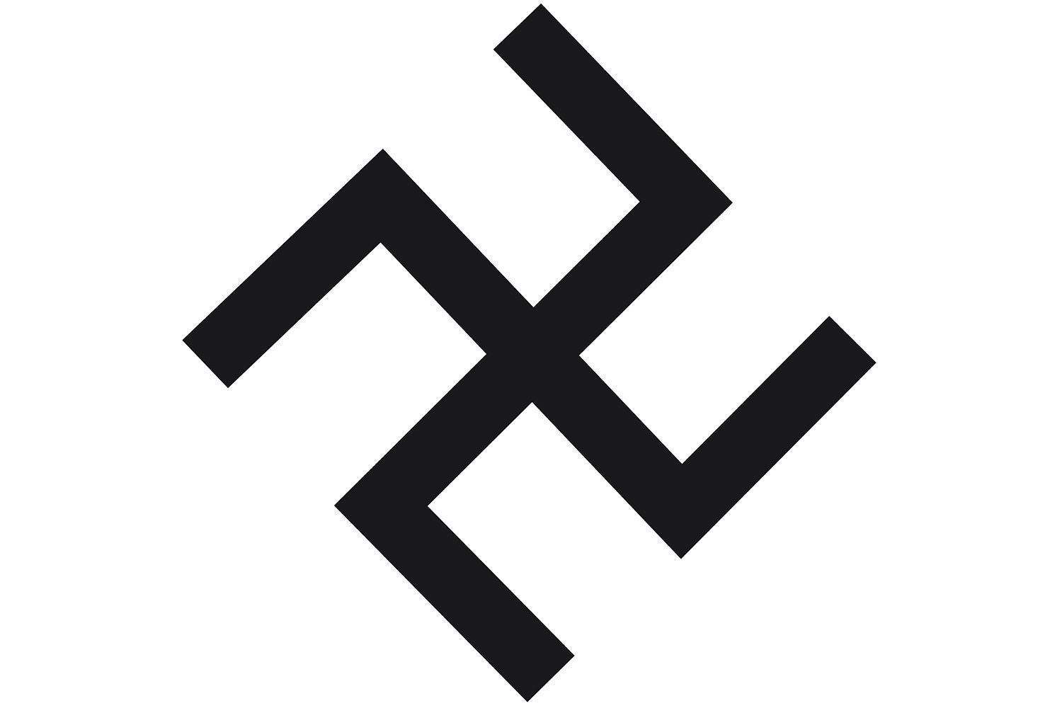 L